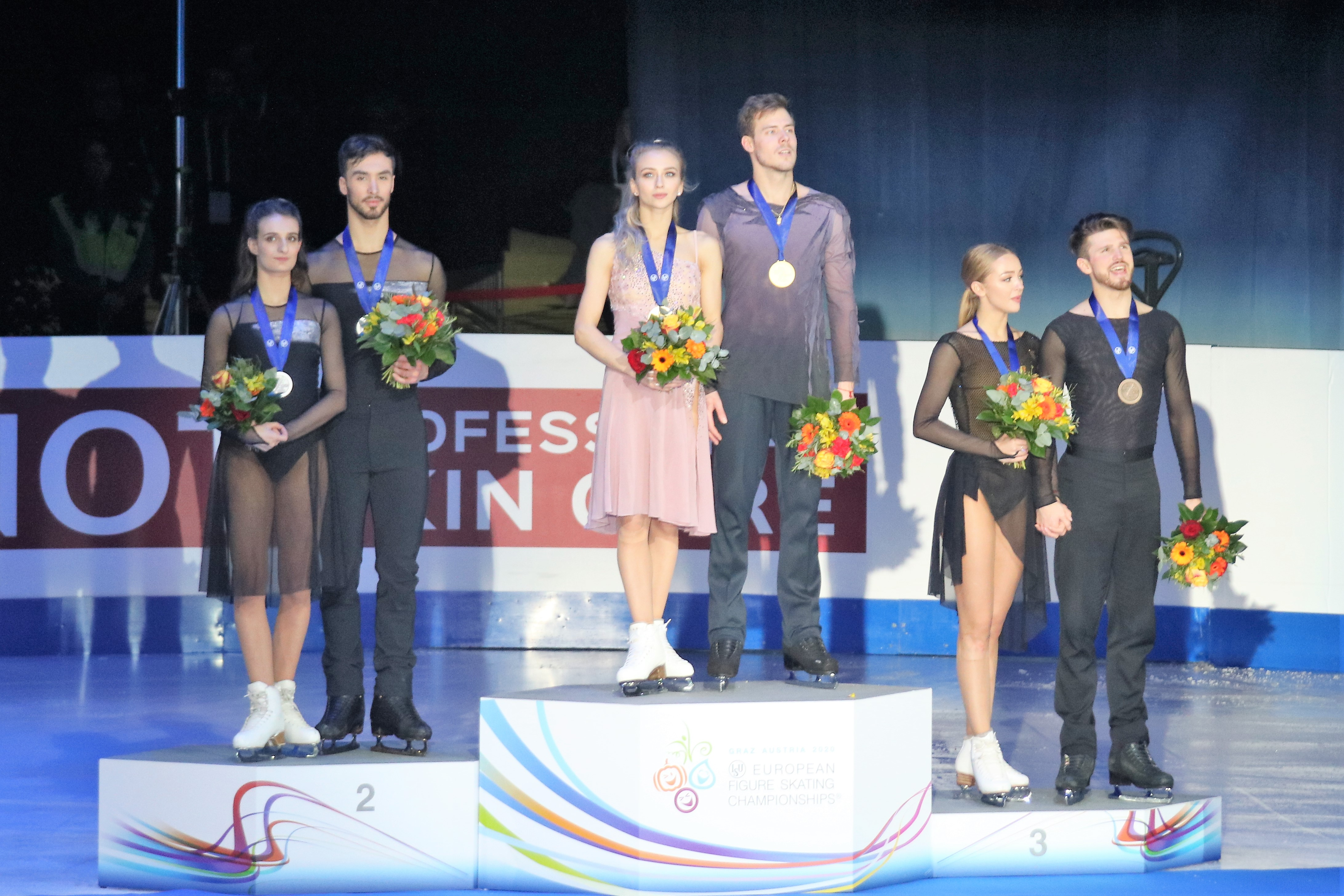 Церемония награждения в танцах на льду на чемпионате Европы по фигурному катанию 2020